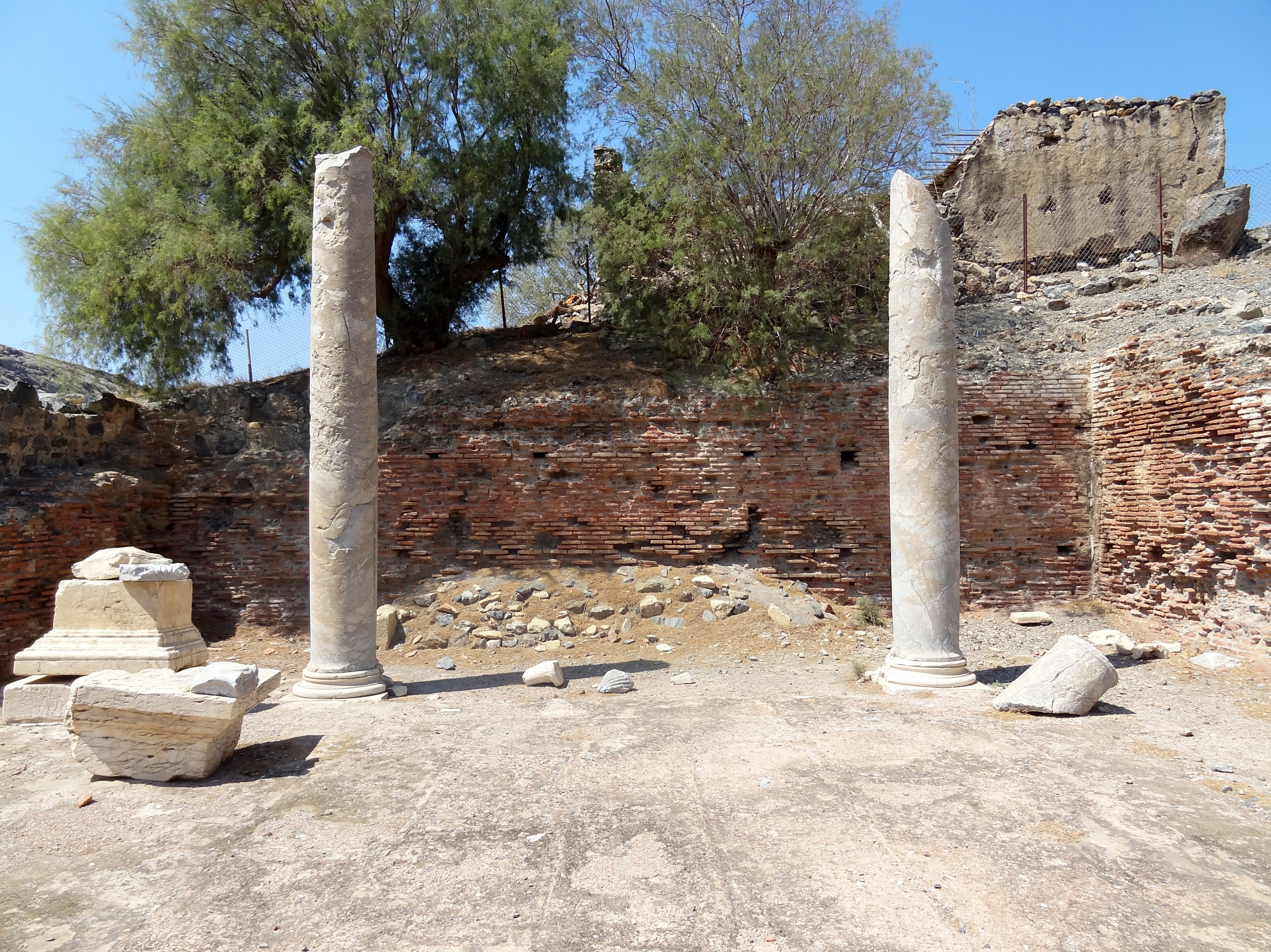 Asklepios-Heiligtum des antiken Leben (Λεβήν) in Lendas, Gemeinde Gortyna, Regionalbezirk Iraklio, Kreta, Griechenland